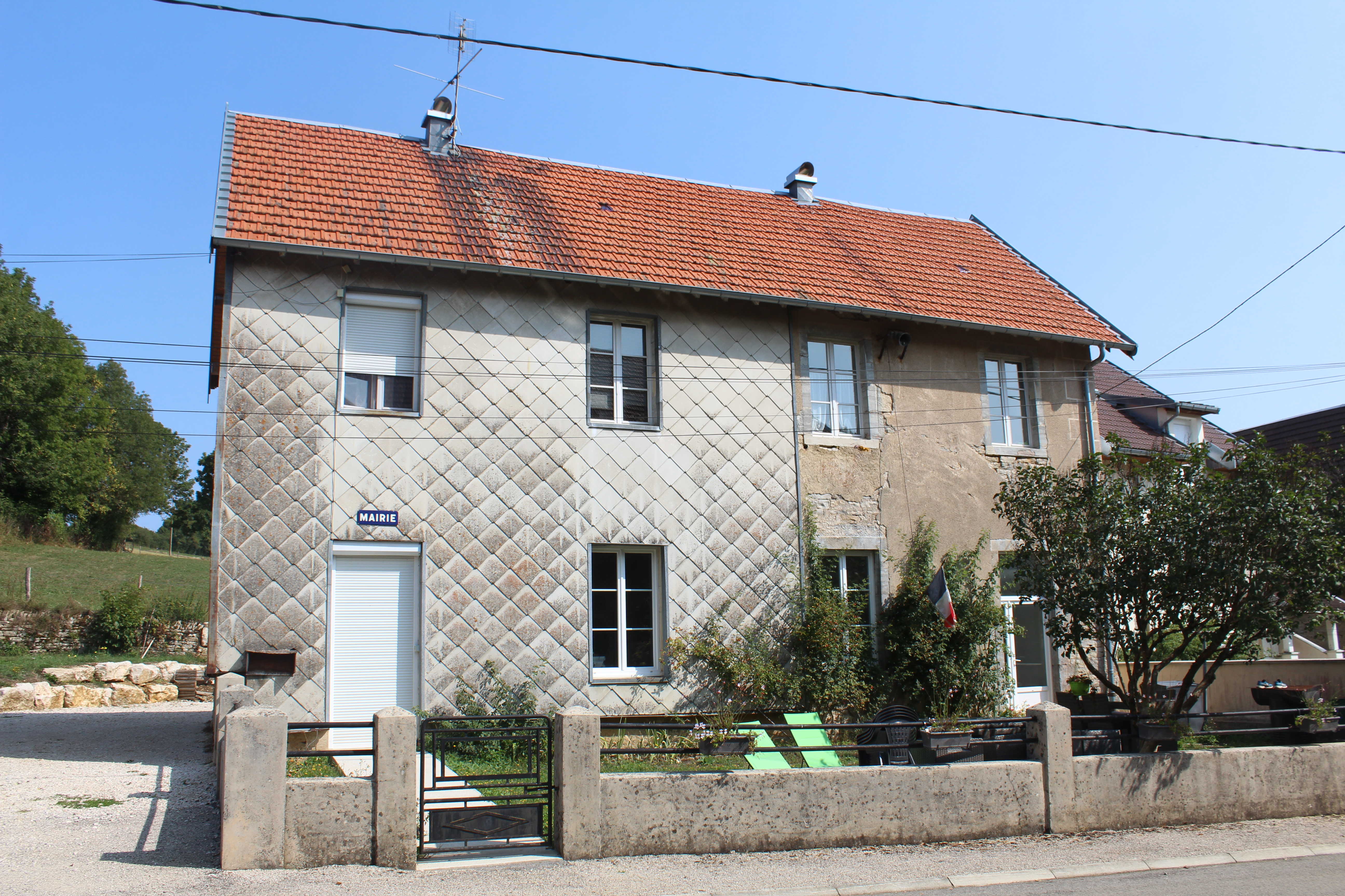 Mairie d'Abergement-lès-Thésy.